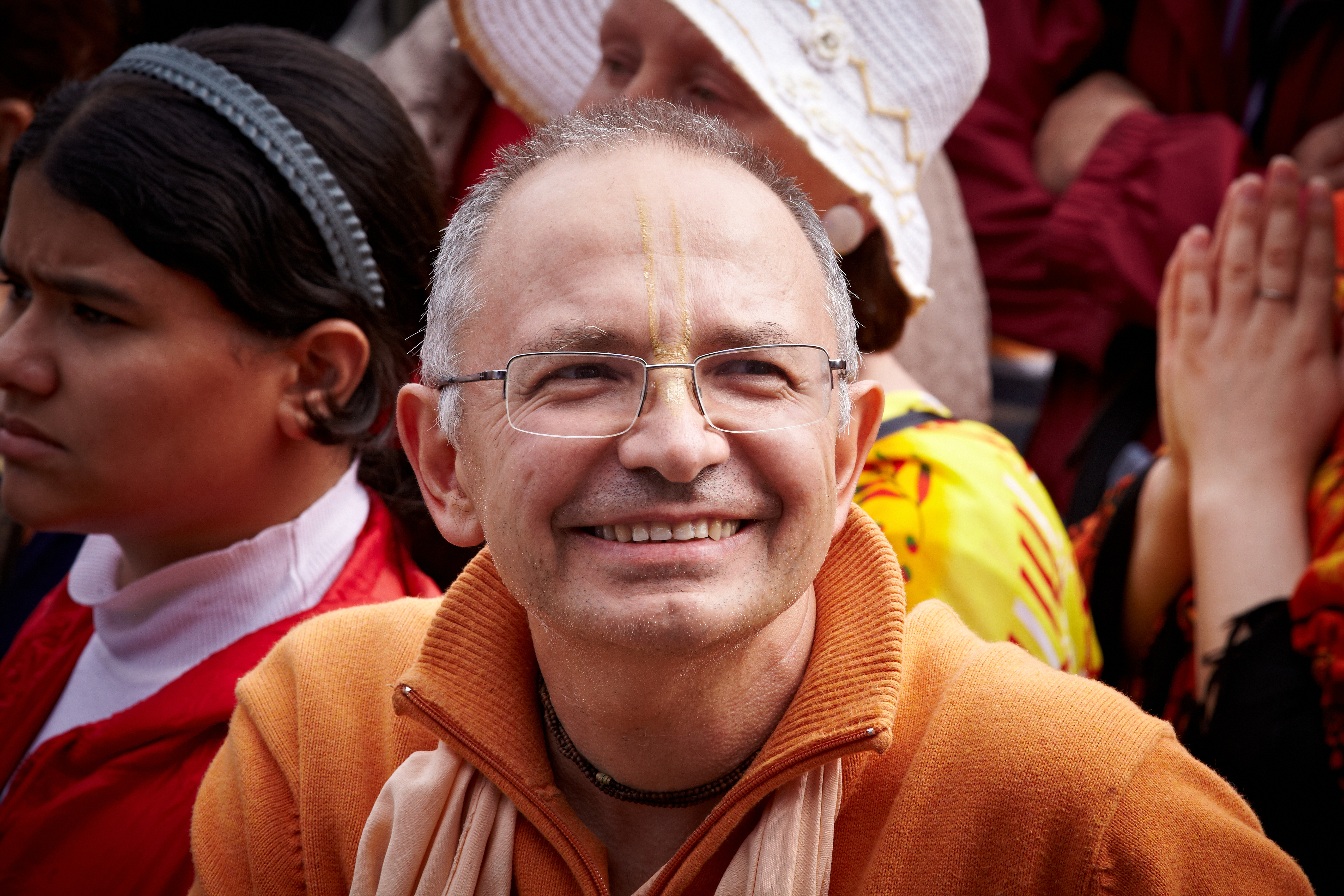 Бхакти Вигьяна Госвами